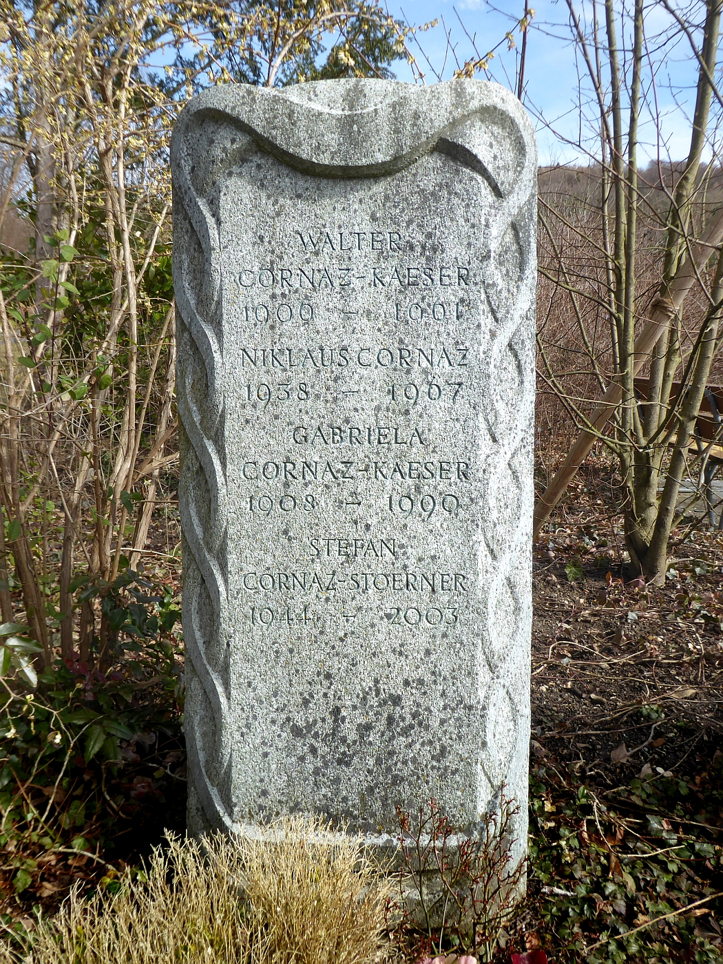 Stefan Cornaz-Stoerner (1944–2003) Lic.phil, Gymnasiallehrer, Politiker, Familiengrab auf dem Friedhof Hörnli, Riehen, Basel-Stadt